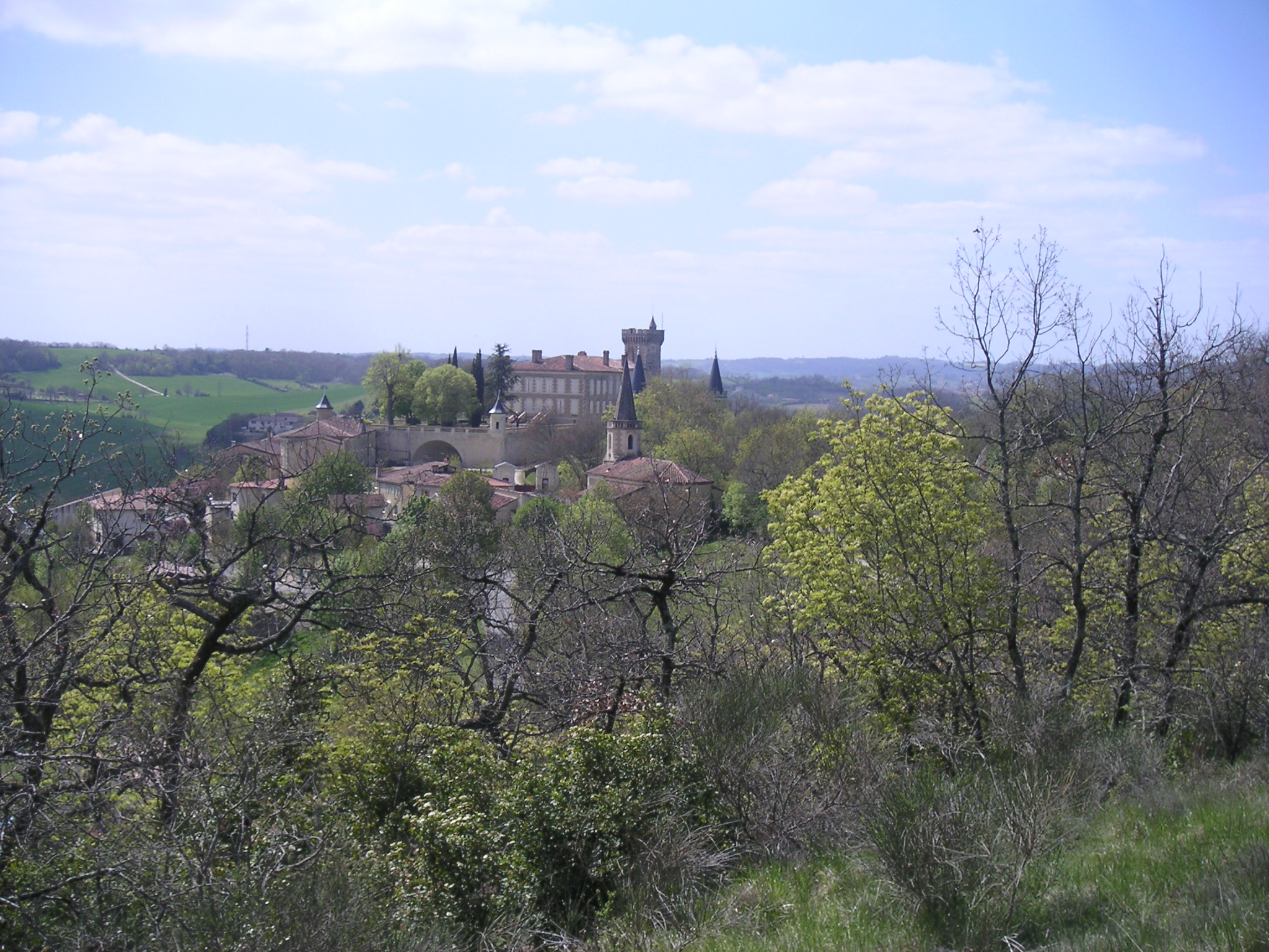 Vue du village de Montégut (Gers, Midi-Pyrénées, France).